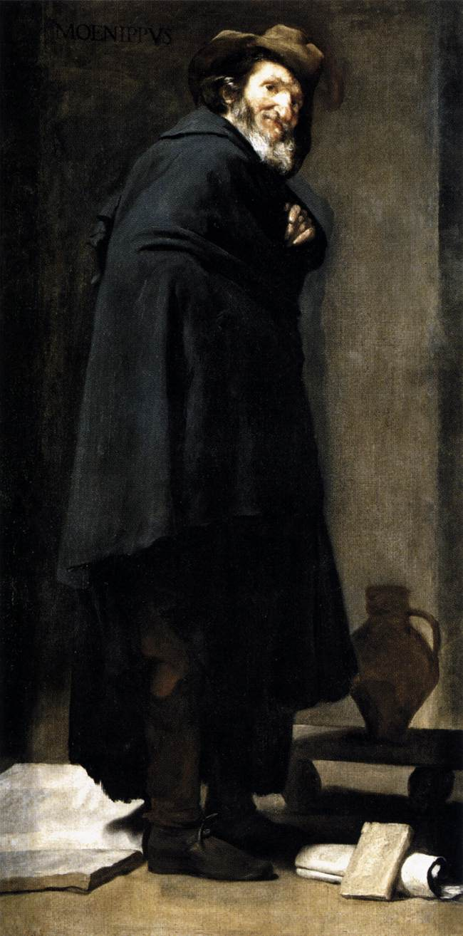 La obra representa al filósofo y escritor griego Menipo de Gadara, y fue ejecutada por el pintor sevillano Diego Velázquez hacia 1638.